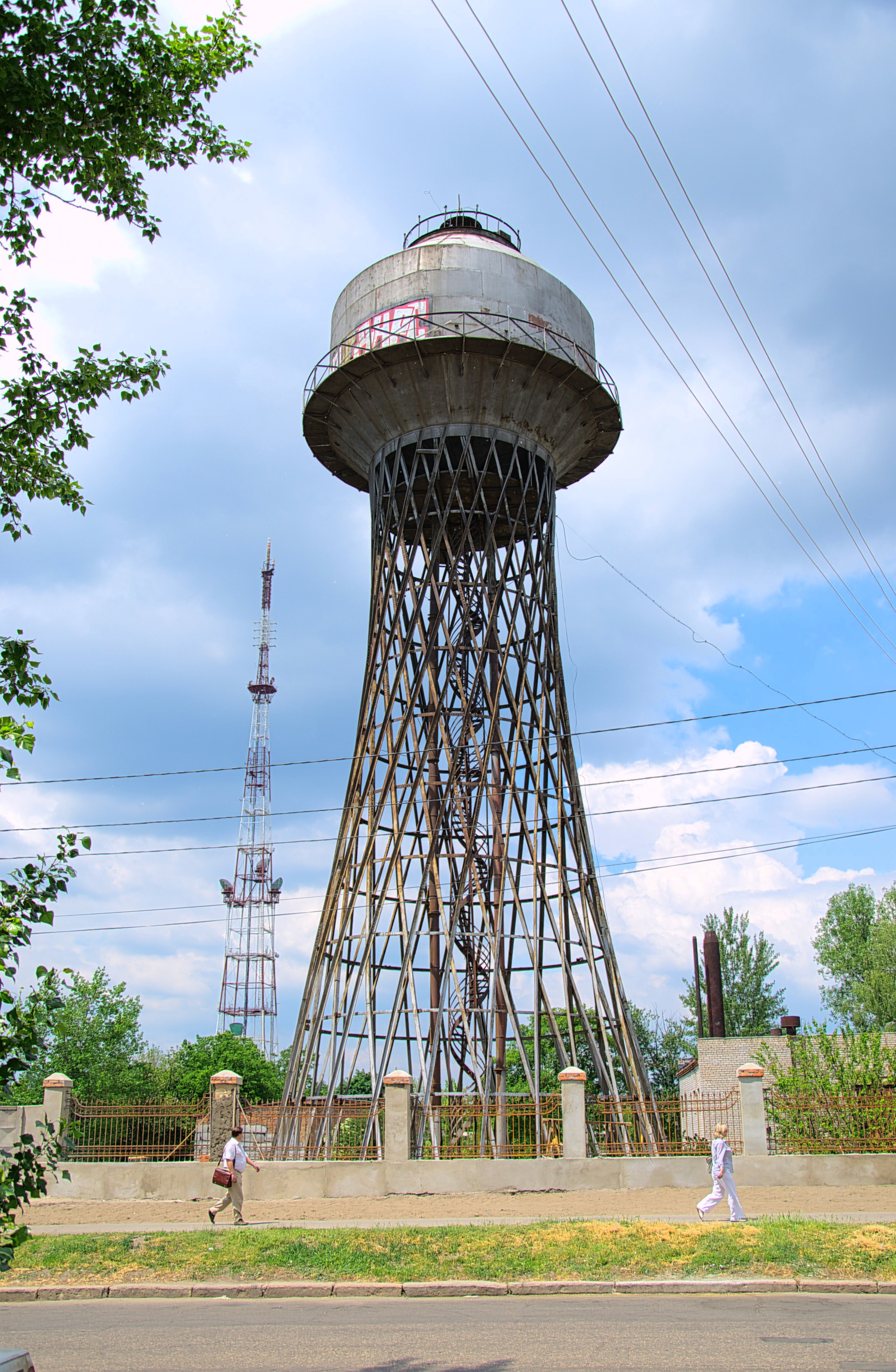 Veja_shuhova_mk.jpg: Вежа Шухова в Миколаєві, 2013 рік